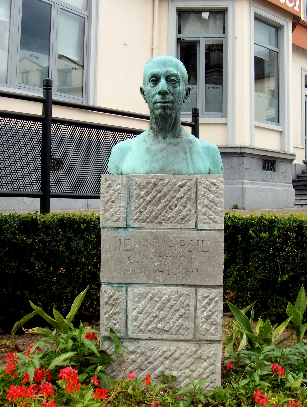 Statue von Jean Absil (Belgischer Komponist) im Ortsteil Bon-Secours der Gemeinde Péruwelz (Belgien, Prov. Hennegau)